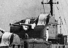 Torretta sulla Ayanami